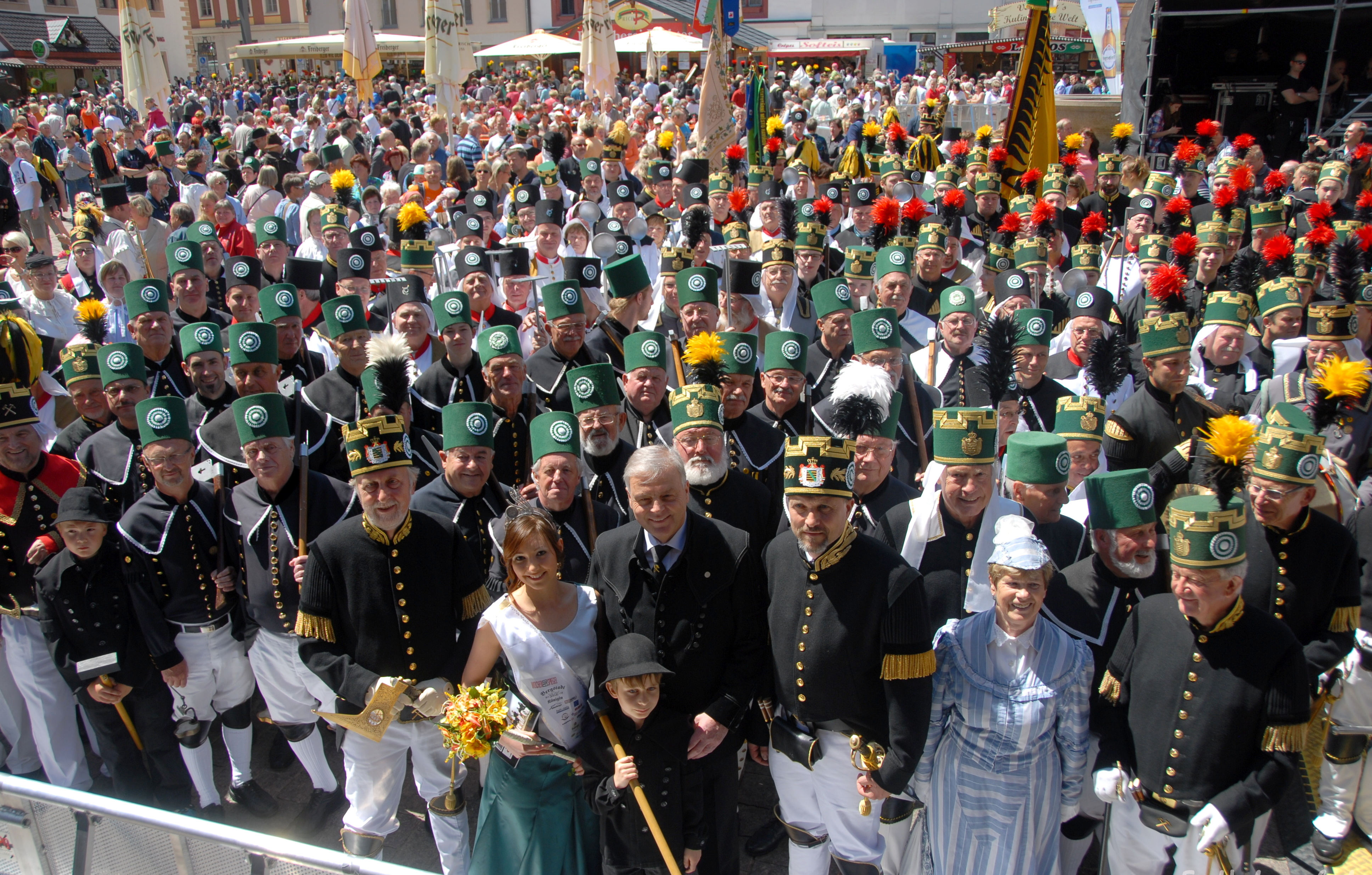 Bergamannsaufzug zum Bergstadtfest 2015 mit Oberbürgermeister Bernd-Erwin Schramm (m.) und (links daneben) der Bergstadtkönigin Karla Mantau.